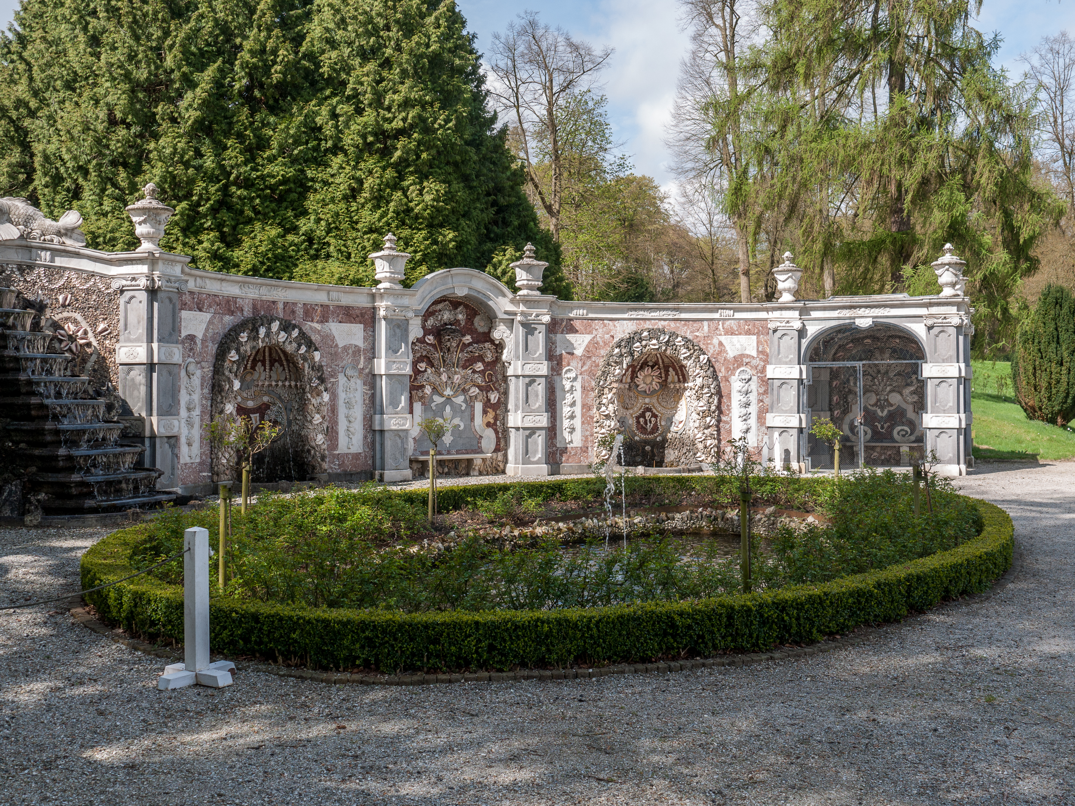 Muschelgalerien im Park des Schloss Rosendael im Gelderland in den Niederlanden